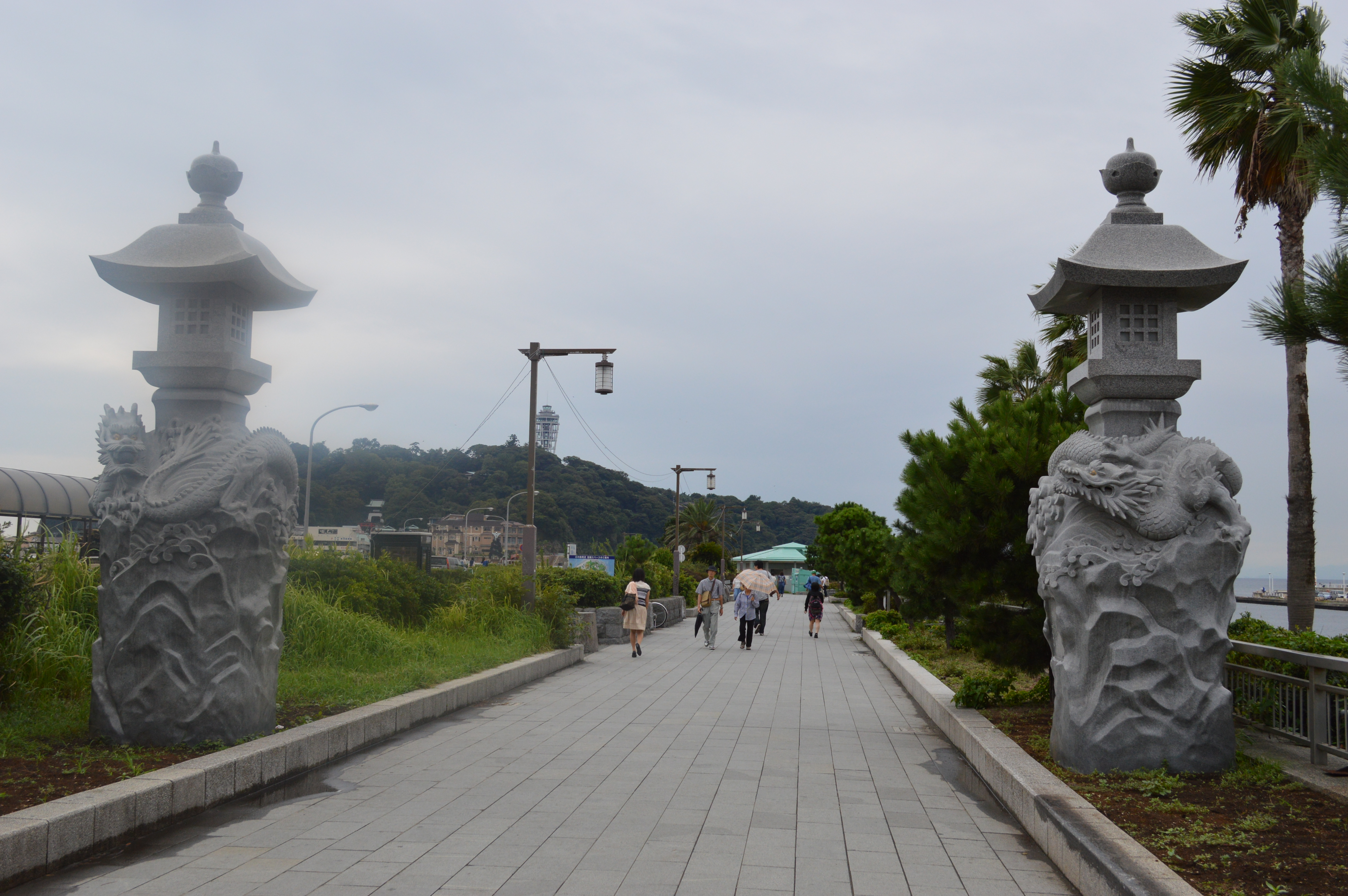 江の島弁天橋